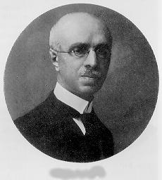 Foto di Luigi Berzolari